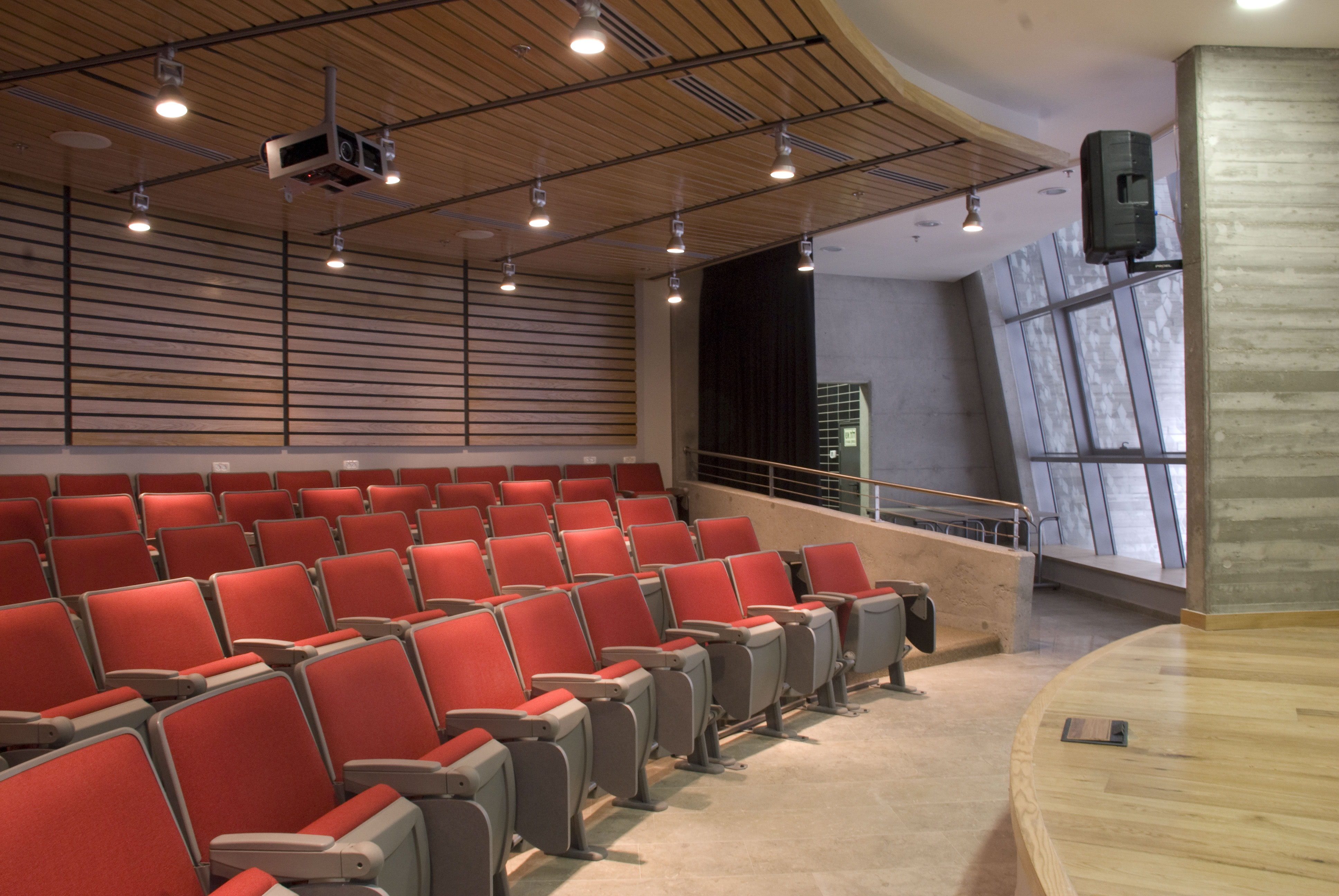 אודיטוריום הספרייה באגף החדש